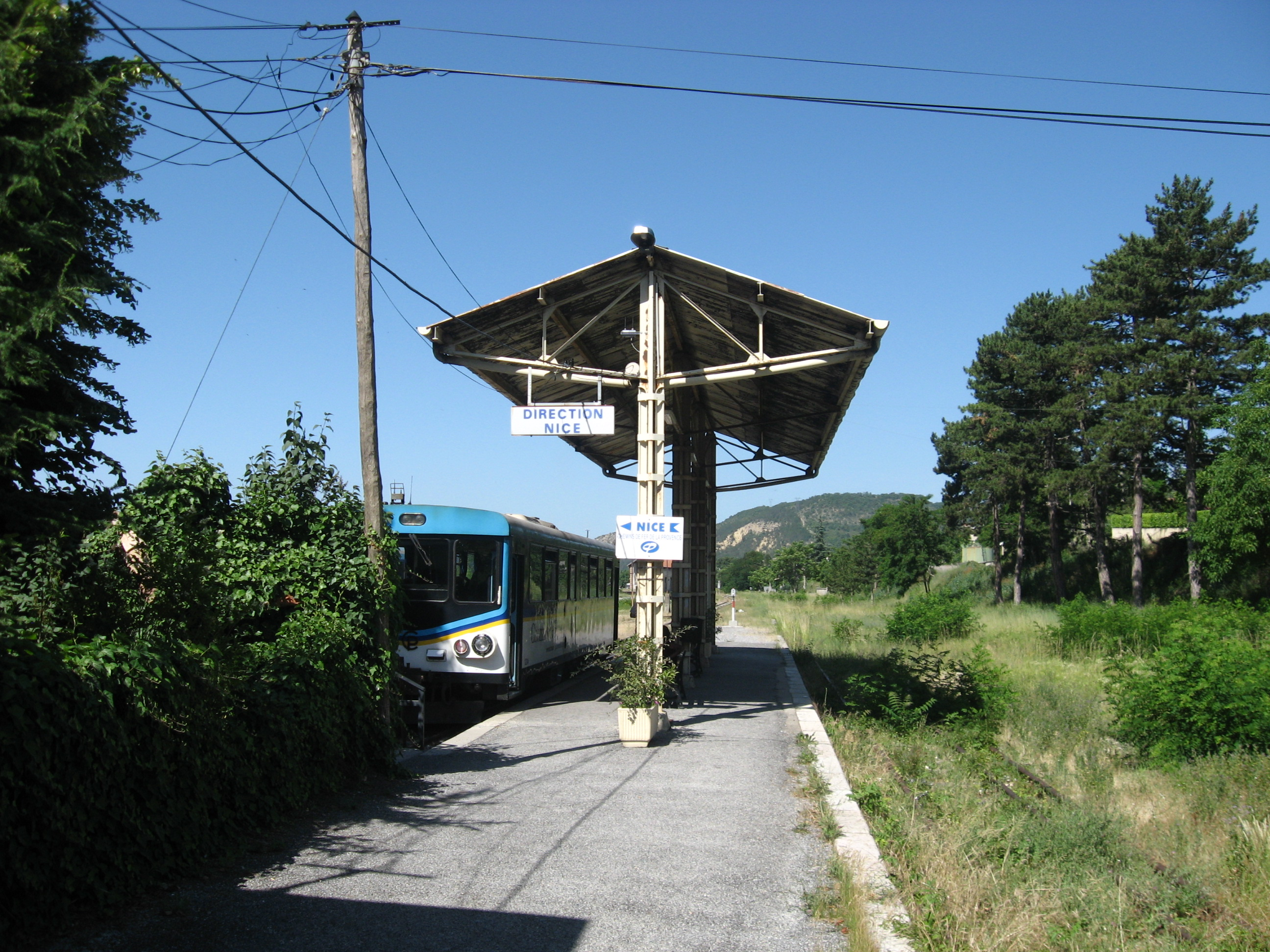 Het vertrekplatform in Digne